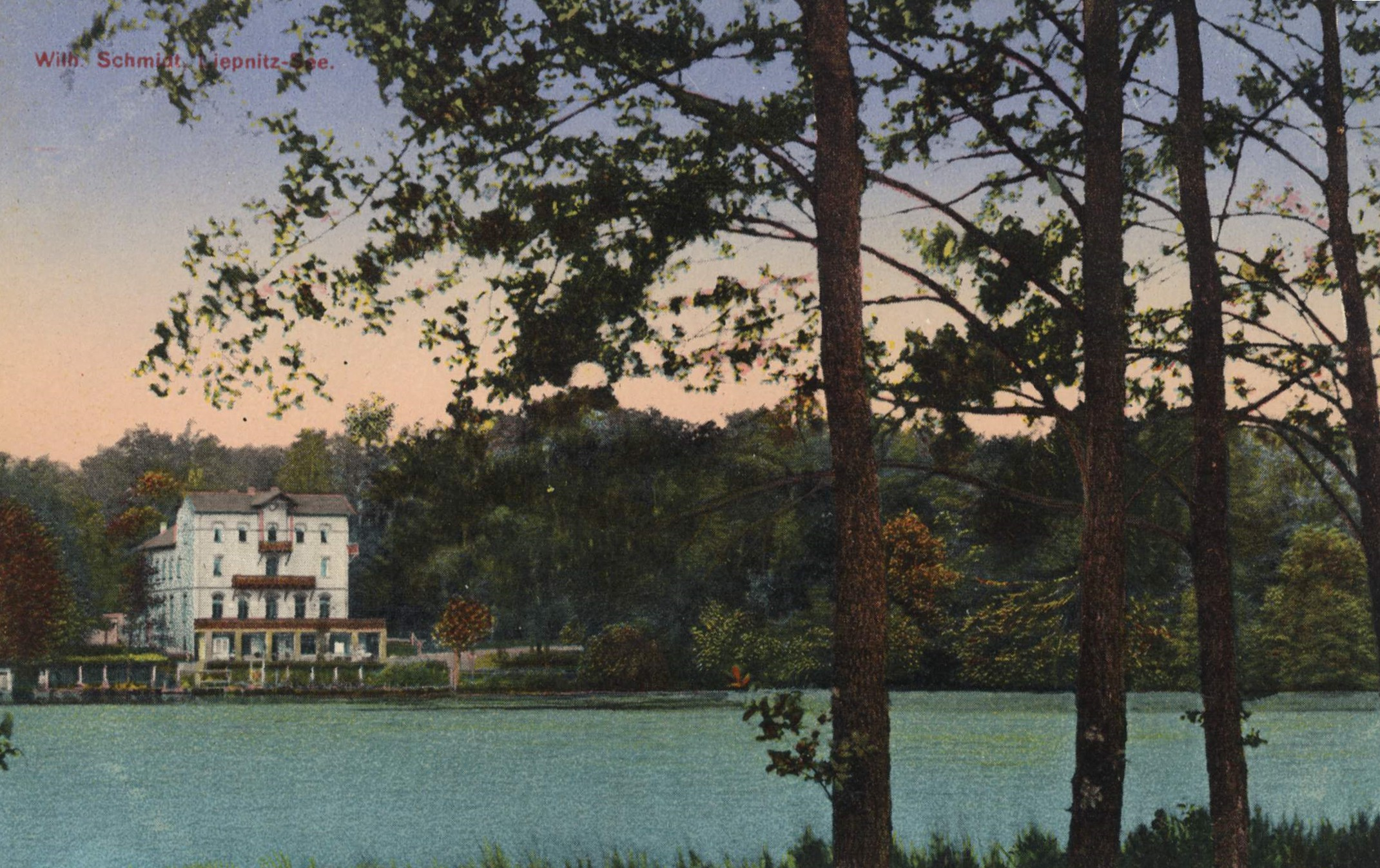 Gasthaus von Wilhelm Schmidt am Liepnitzsee